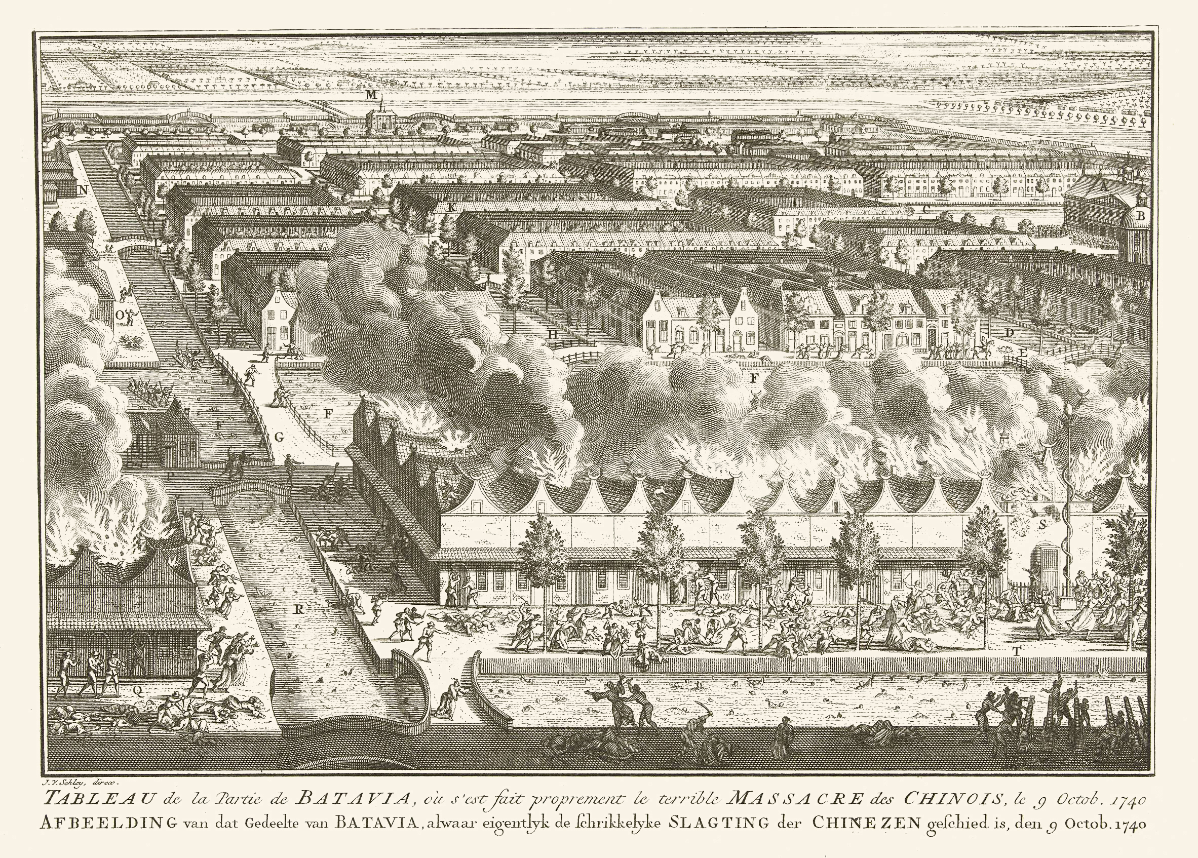 1740 Batavia massacre